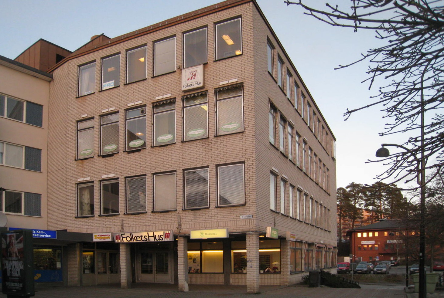 Folkets hus, Kallhäll, Järfälla kommun.